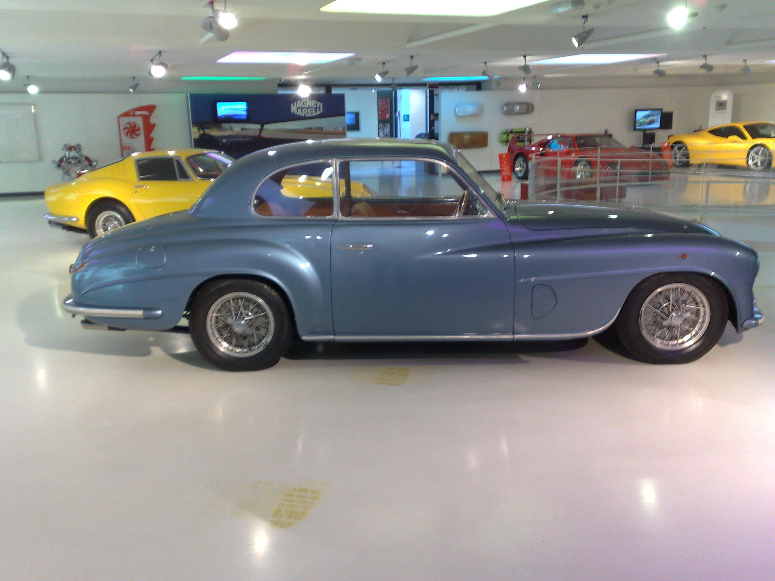 Ferrari 166 Inter Touring Coupé Aerlux, Galleria Ferrari, Maranello, 12 Febbraio 2011